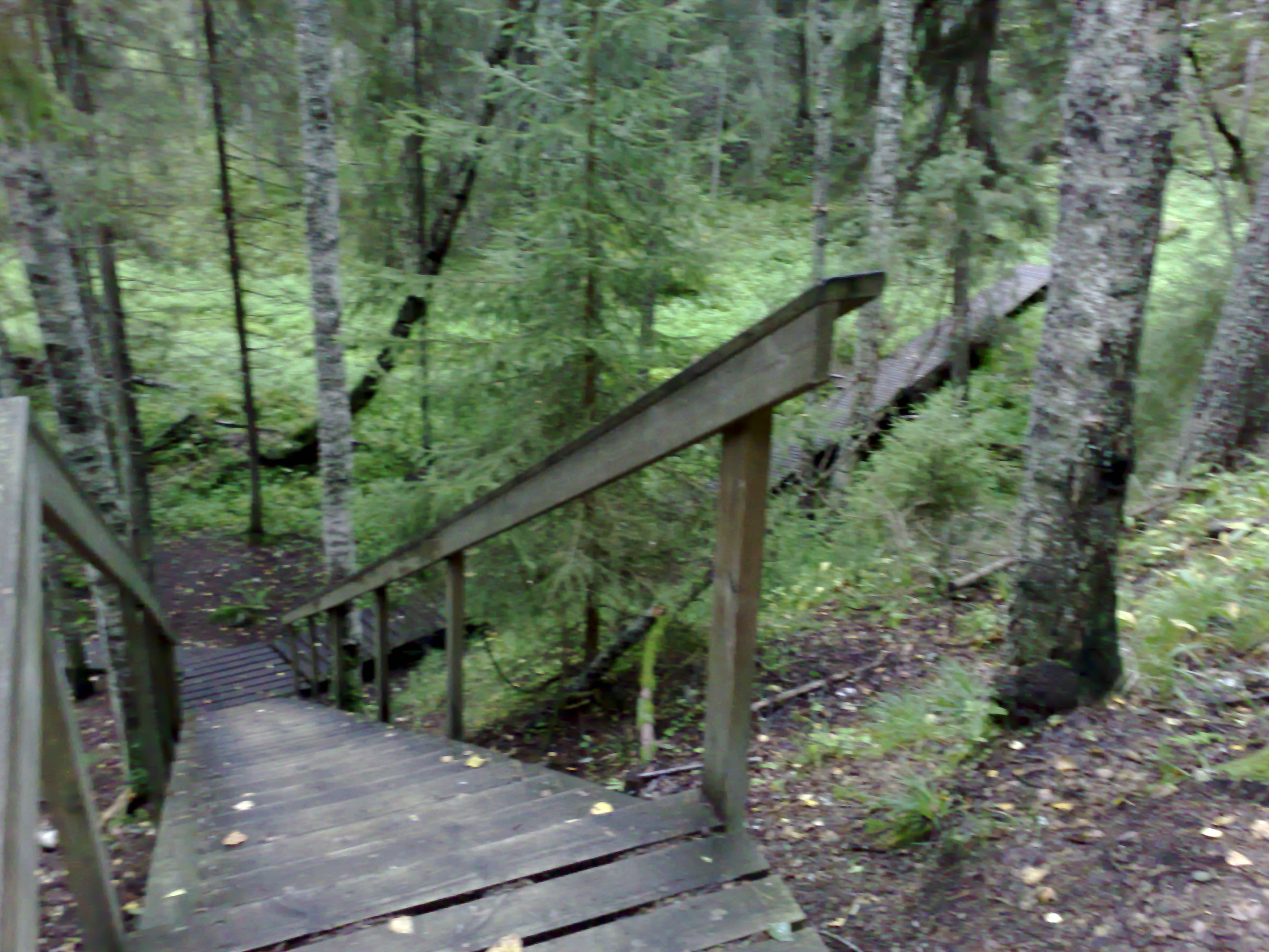 Ryövärinkuopan luonnonsuojelualueen portaat Ruovedellä